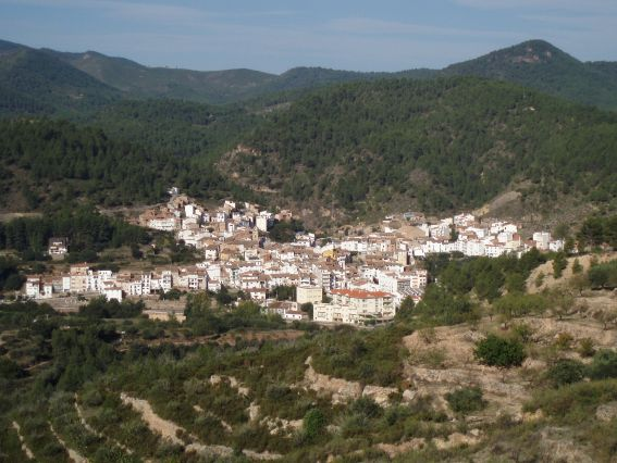 Vista global de Montán